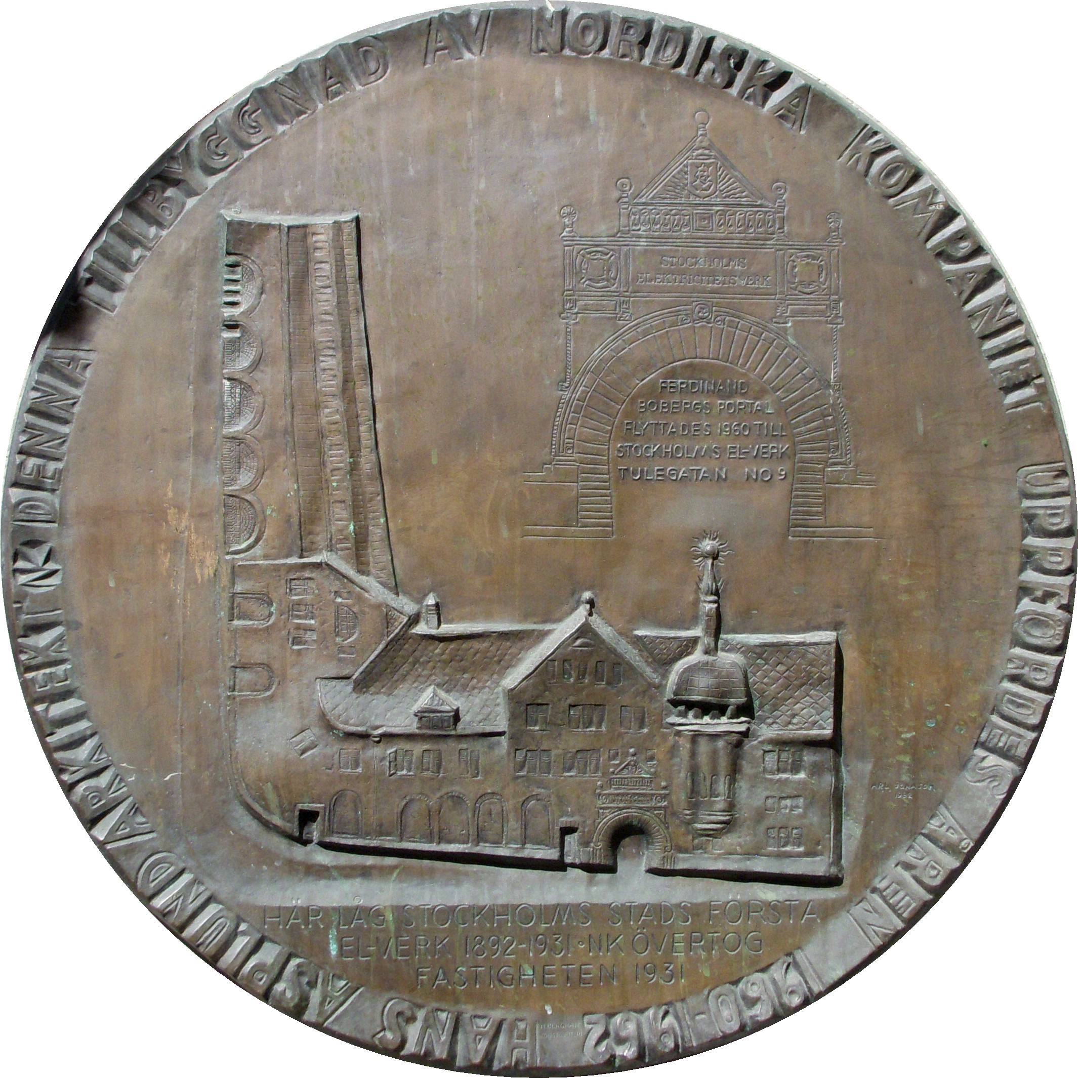 Brunkebergsverket minnestavla vid NK-varuhuset